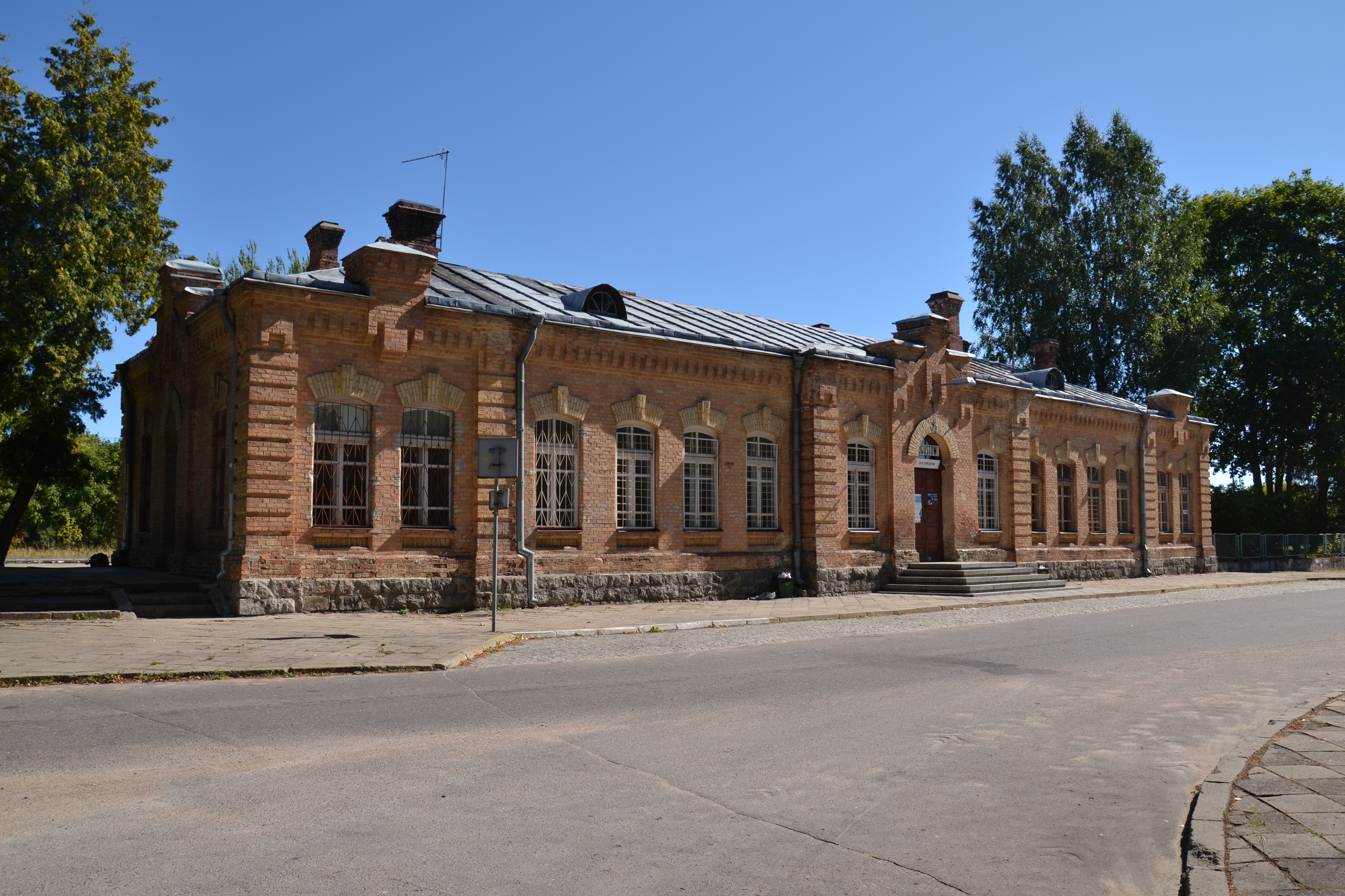 Widok dworca kolejowego w Augustowie od strony parku This photo was taken during Railway Wikiexpedition 2015 set up by Wikimedia Polska Association in cooperation with Fundacja Grupy PKP. You can see all photographs in category Wikiekspedycja kolejowa 2015.